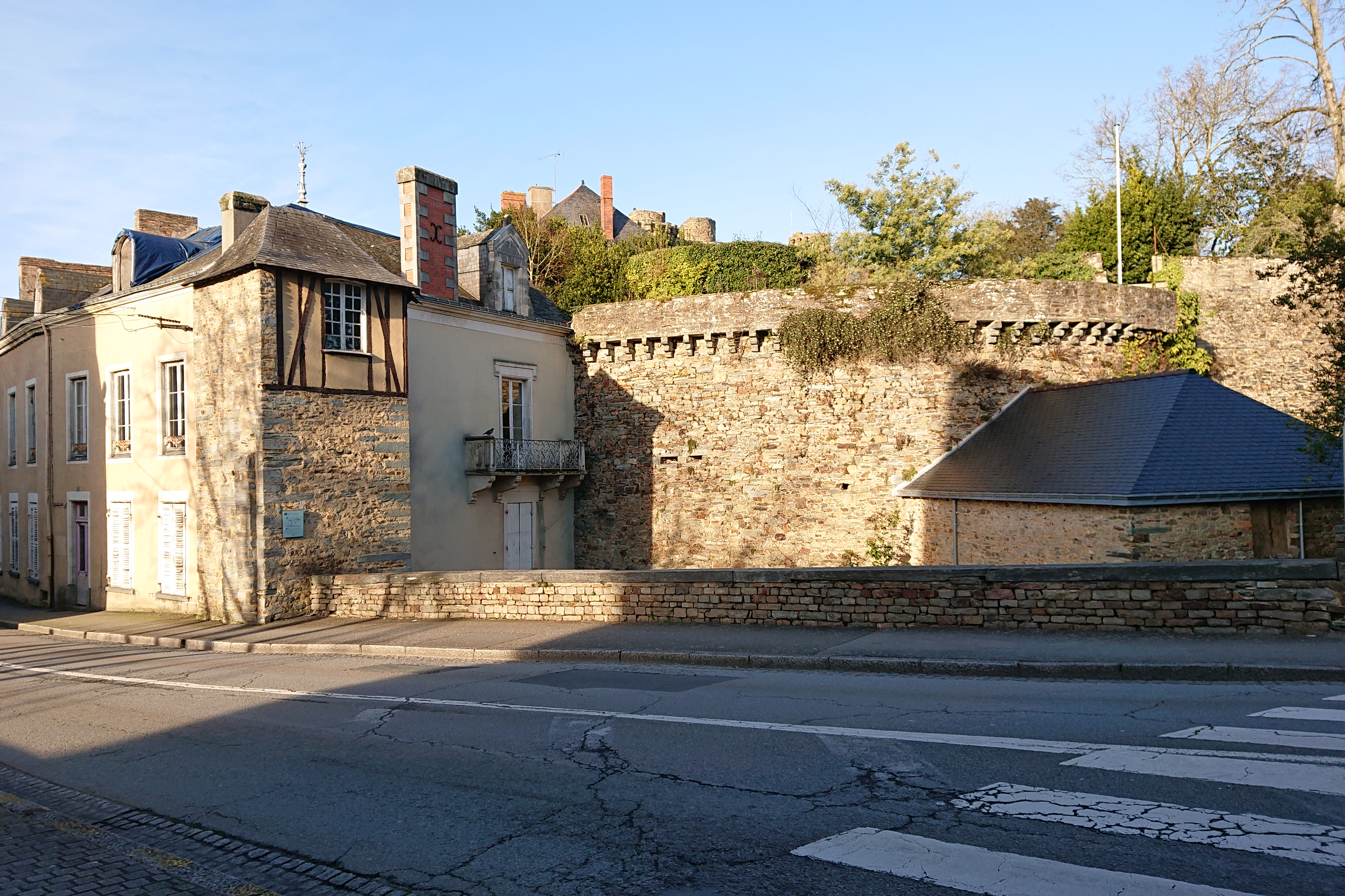 Bastion du Château de Châteaubriant, France.